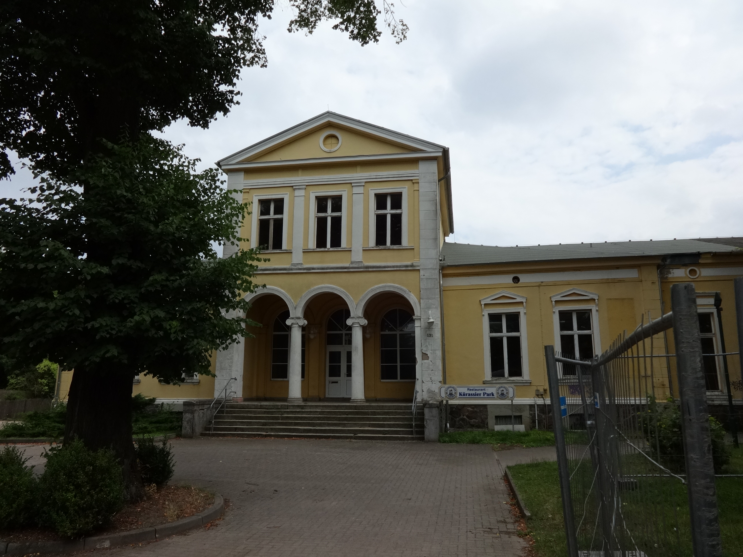 Denkmalgeschütztes ehemaliges Offizierskasino in Pasewalk, Mecklenburg-Vorpommern